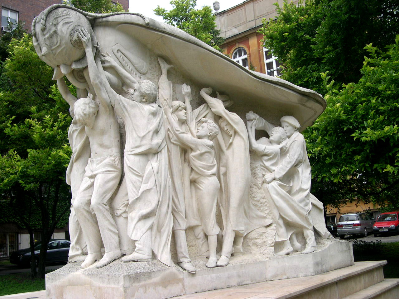 1956-os emlékmű Szegeden. Melocco Miklós (továbbá Balogh Miklós, Benke Zoltán, Guth Viktor, Király Lőrinc és Párkányi Ráab Péter) alkotása (1997) A szobor a szabadság pillangóját ábrázolja, amit 19 '56-os fiatal hordoz. Köztük van az ifjú Latinovits Zoltán, Mansfeld Péter (akit 18. születésnapja után 11 nappal végeztek ki), Danner János (1929-1956; a szegedi forradalom mártírja), és a szobrász is, aki 1956-ban volt fiatal. A lepke szárnyain Illyés Gyula Egy mondat a zsarnokságról című költeményének részletei olvashatók. Forrás: köztérkép